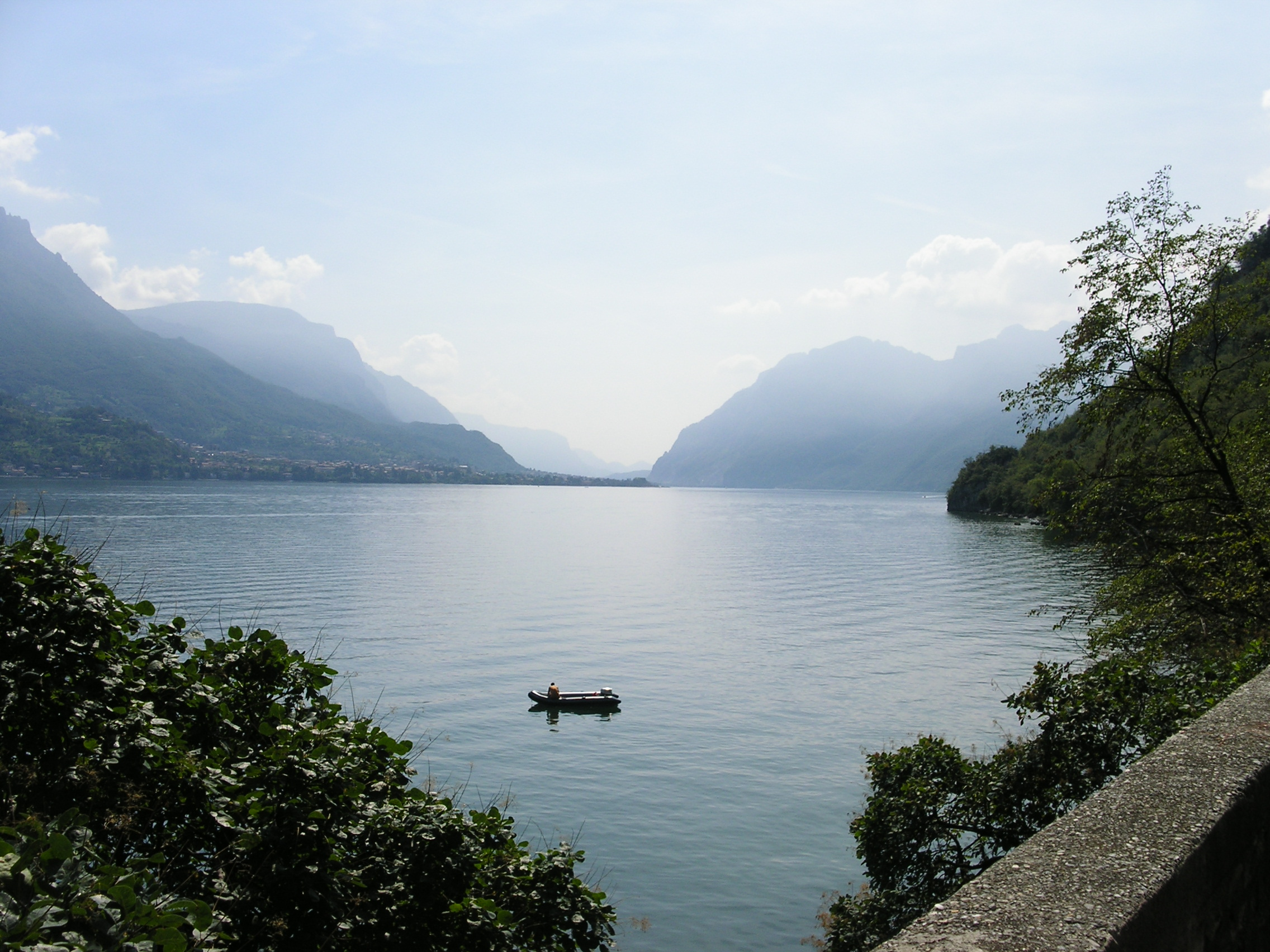 Lago di Lecco, Blick Richtung Lecco